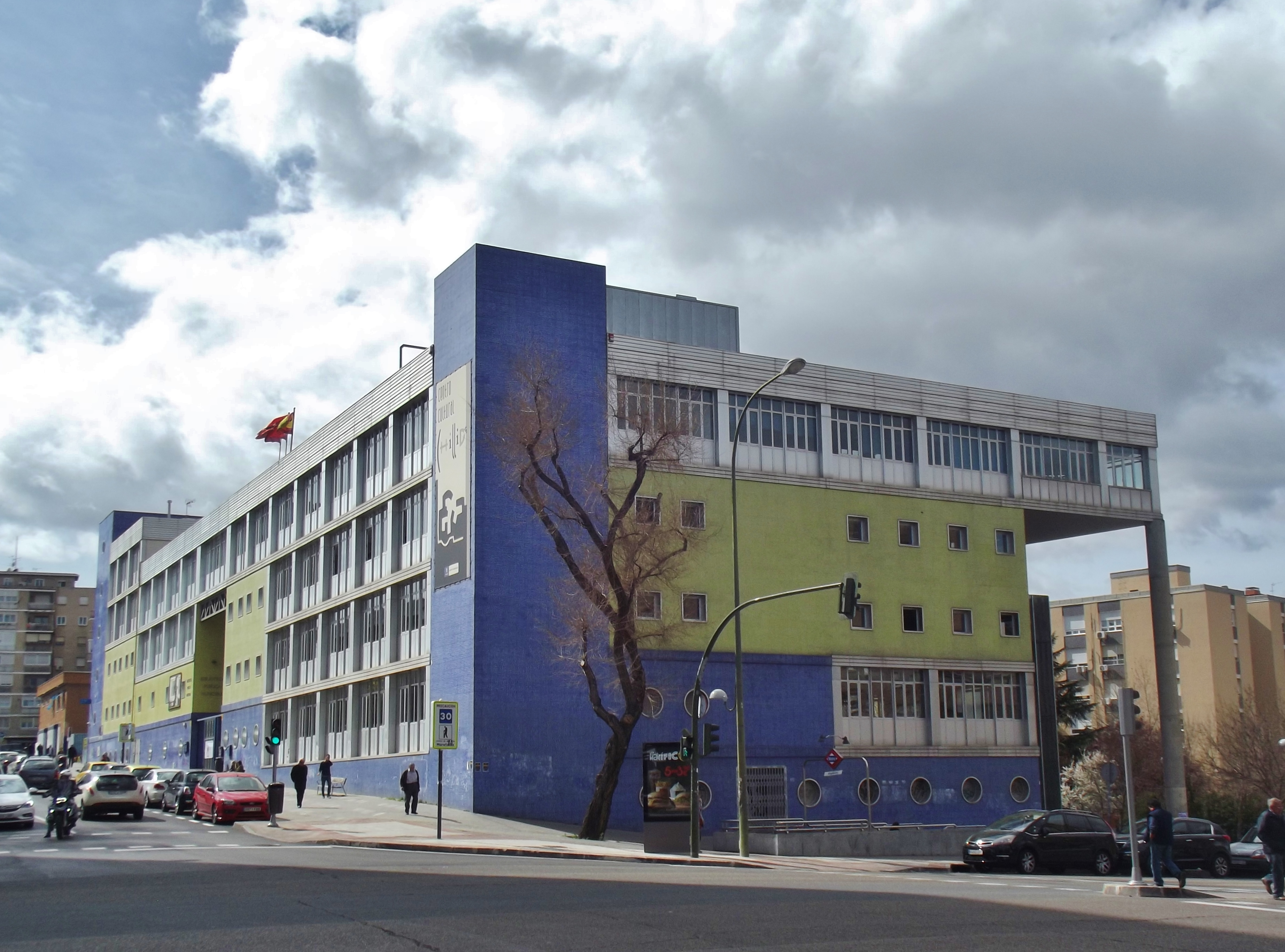 Biblioteca Jurídica Municipal Eduardo Chillida, Madrid.